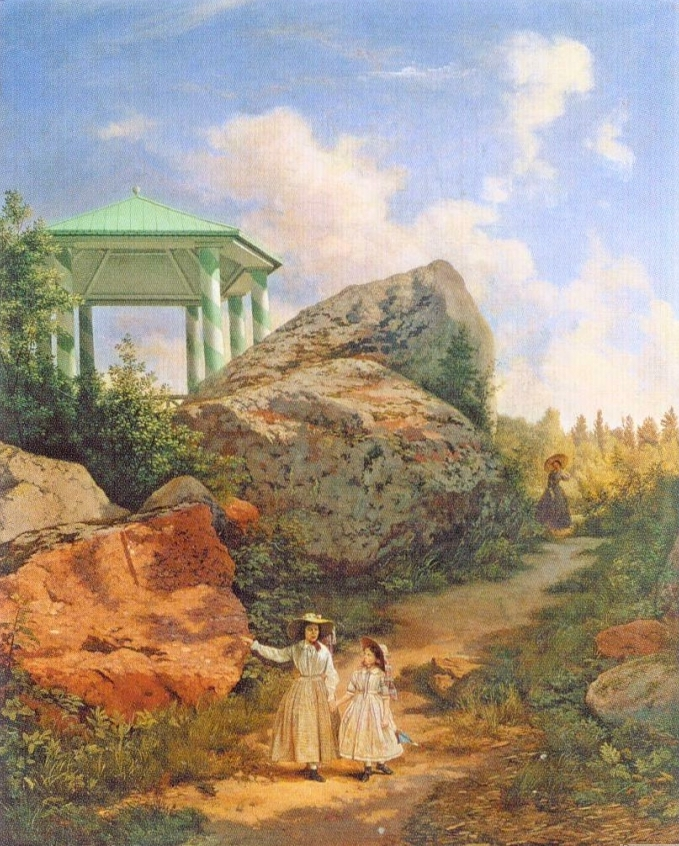 Картина «Вид в саду дачи Марковиль в Финляндии» (1855, ГТГ).